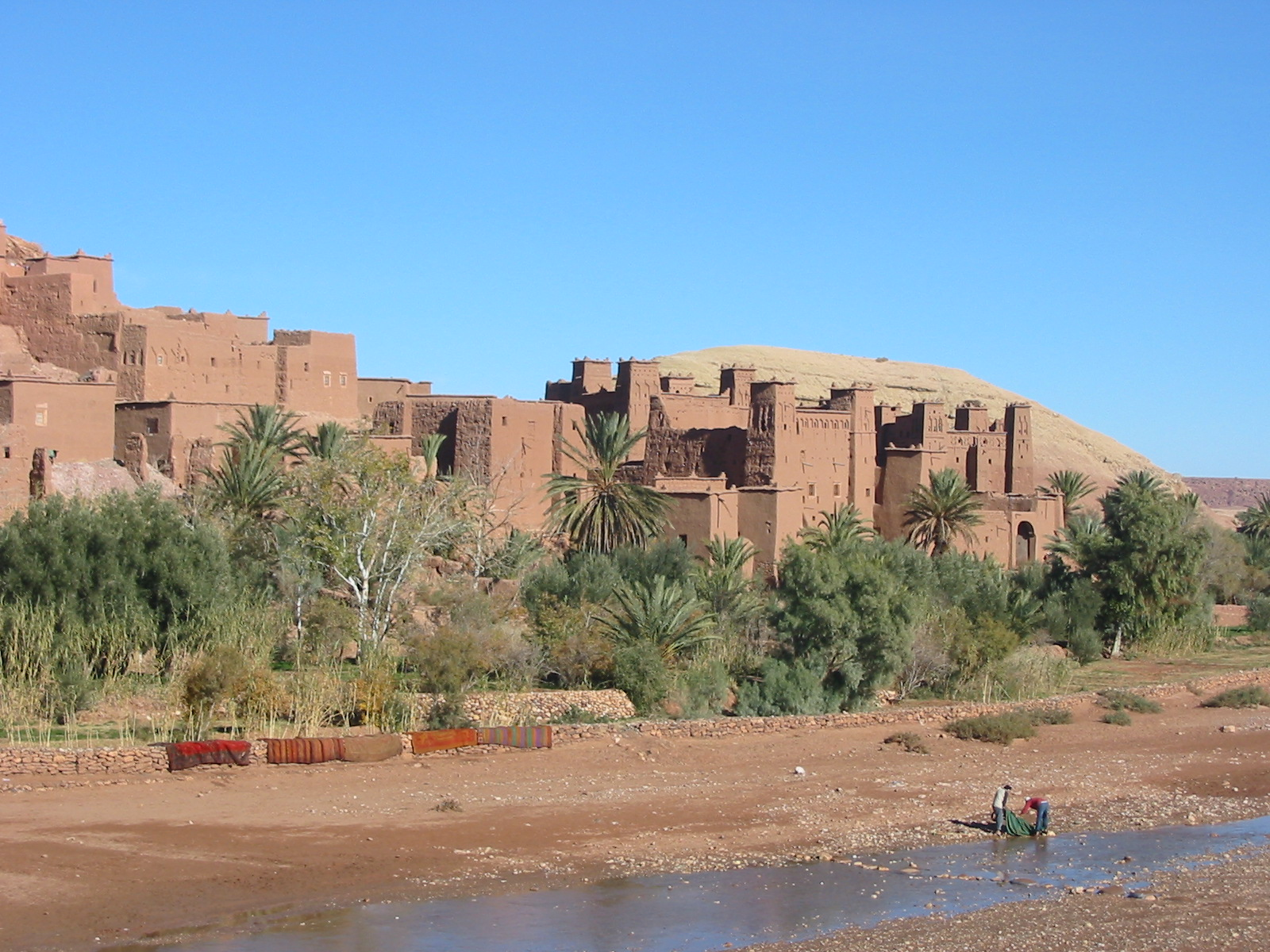 Aït Benhaddou along river bank